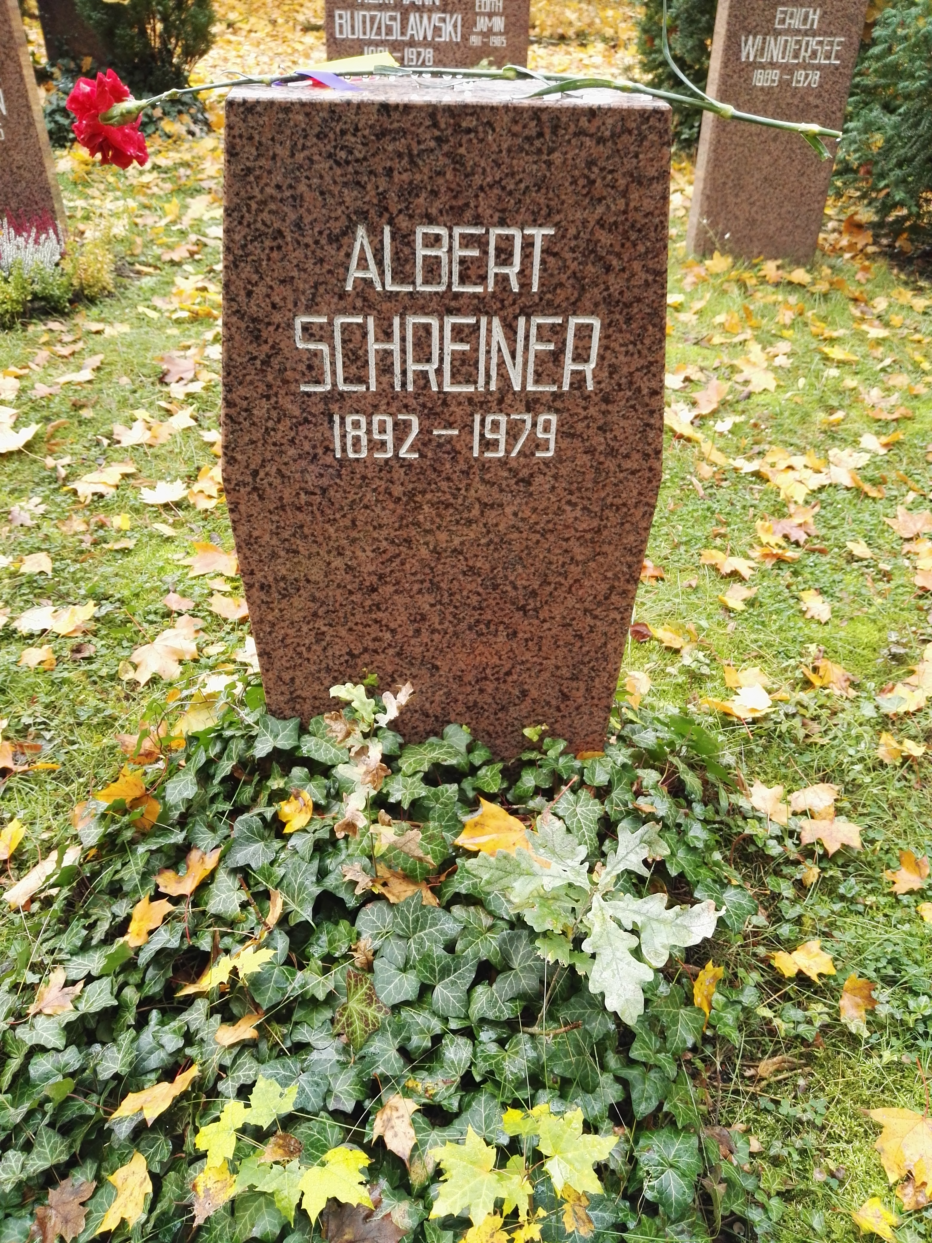 Grab von Albert Schreiner auf dem Sozialistenfriedhof des Zentralfriedhofs Friedrichsfelde